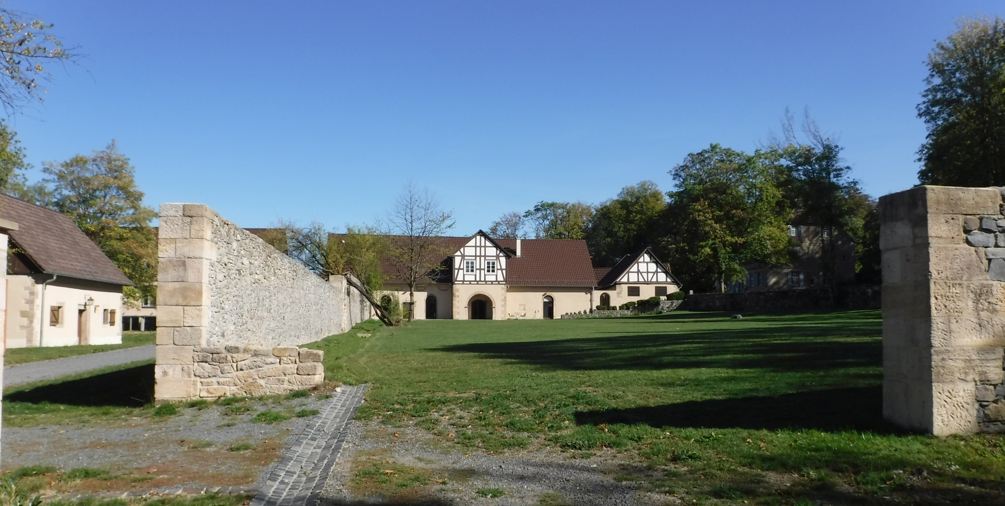 Schloss und Gut Großropperhausen, das größte Barockgut Hessens